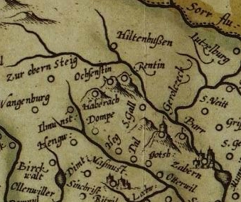 Carte "Alsatia inferior" de Gérard Mercator, centrée sur Ochsenstein